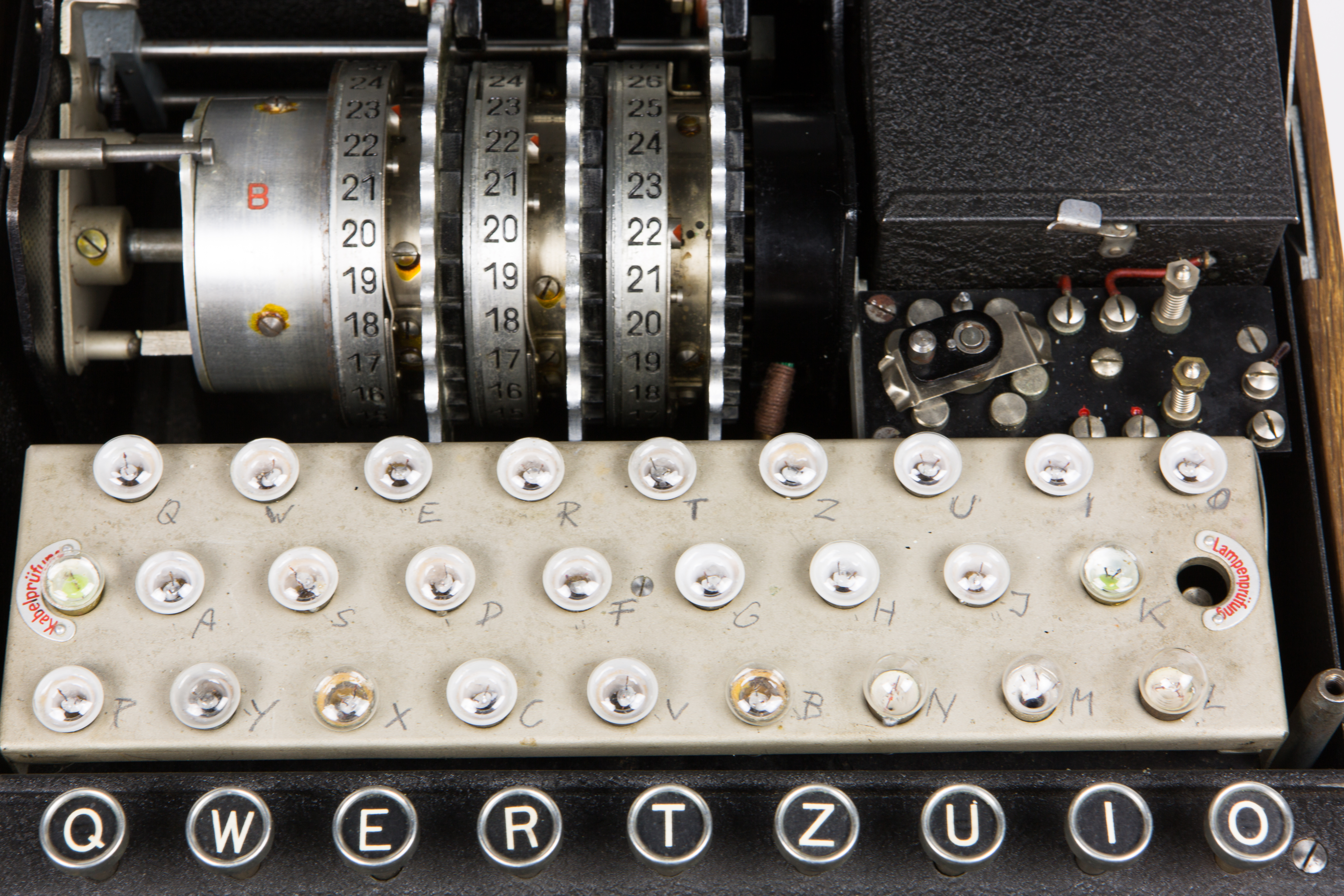 Machine Enigma (Allemagne)